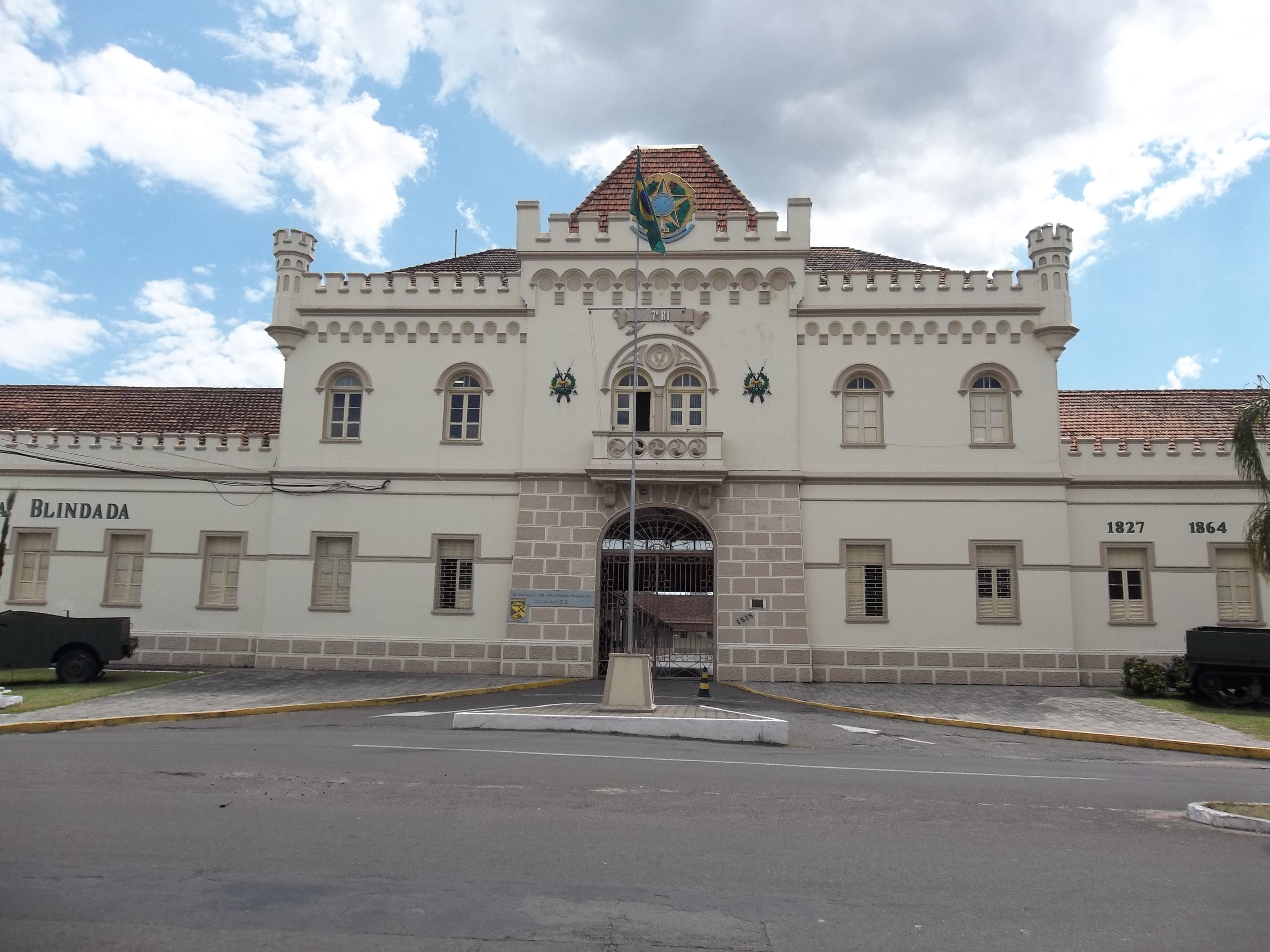 6ª brigada de infantaria blindada. Noal, Sede, Santa Maria, Rio Grande do Sul, Brasil